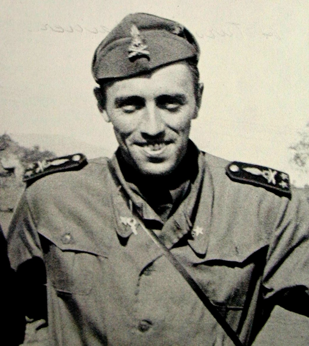 Arturo Maineri de Meichsenau